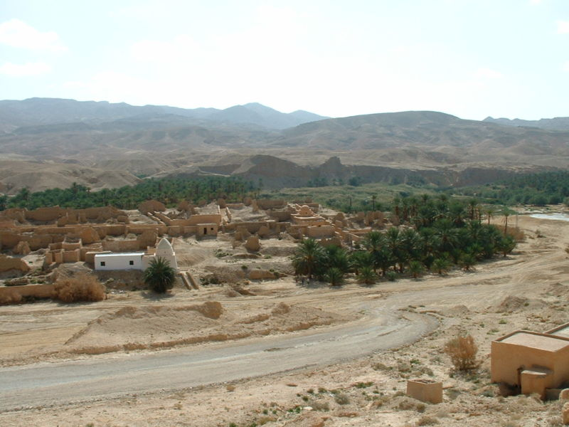 Photographie personnelle du vieux village de Tamerza en Tunisie. Seul le marabout (en blanc) est encore utilisé